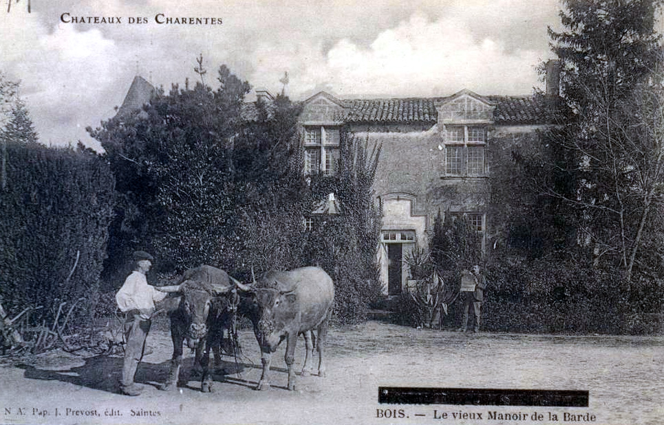 Carte postale 1910 Château de la Barde